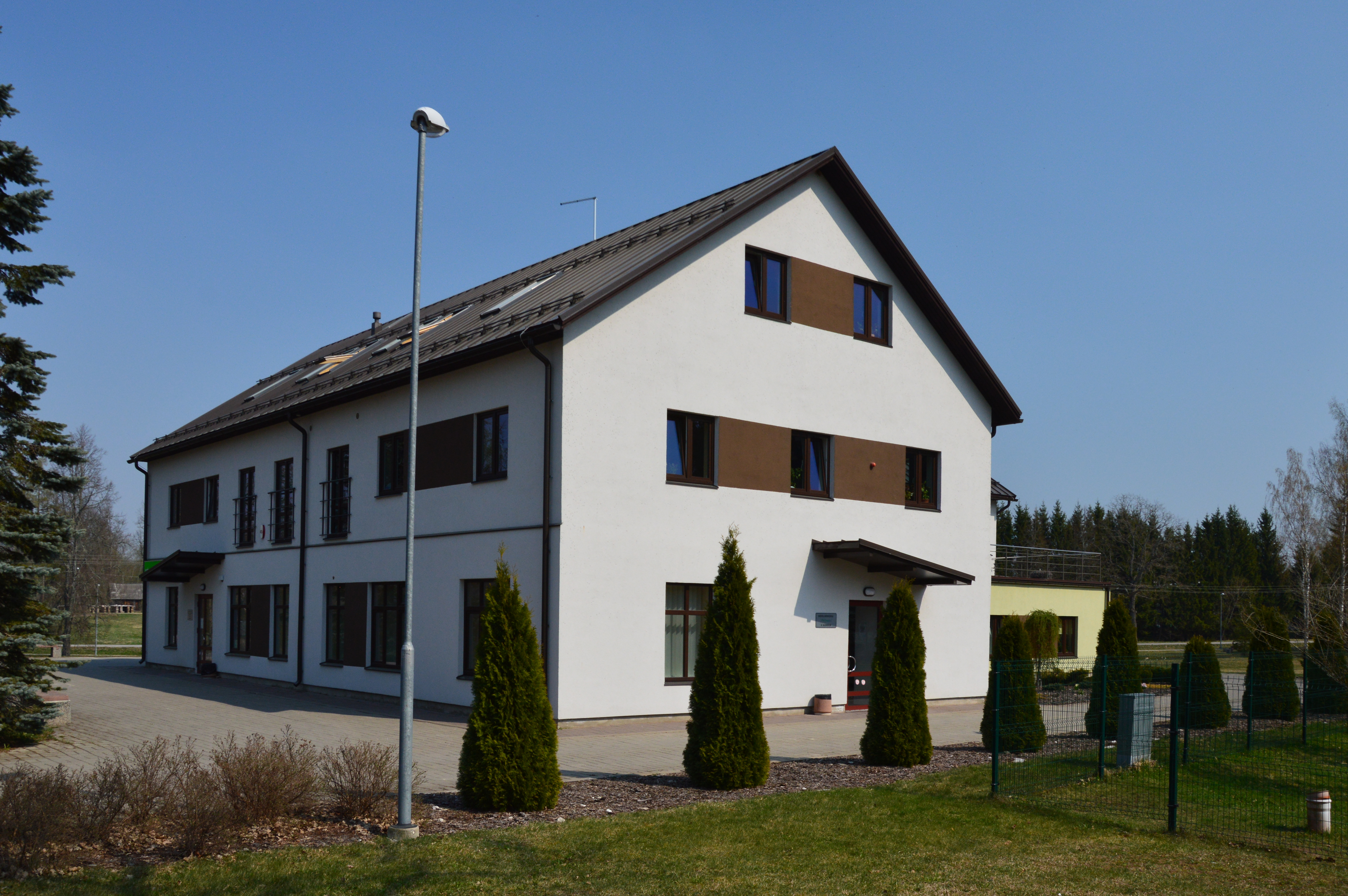 Mõniste teeninduskeskus